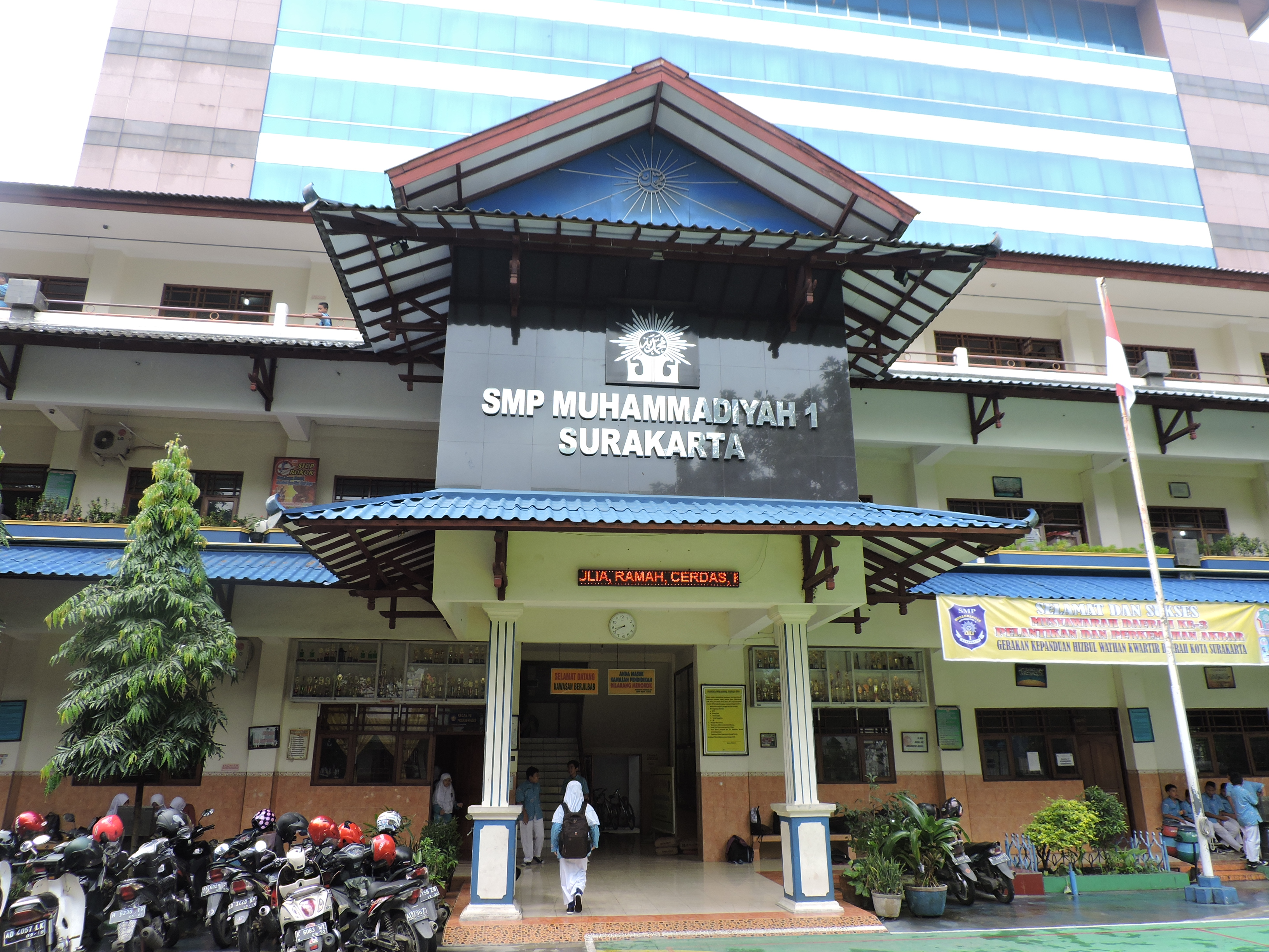 Gedung smp muhammadiyah 1 simpon surakarta tahun 2017, sudah mengalami perkembangan yang luar biasa. Gedung lantai 4.